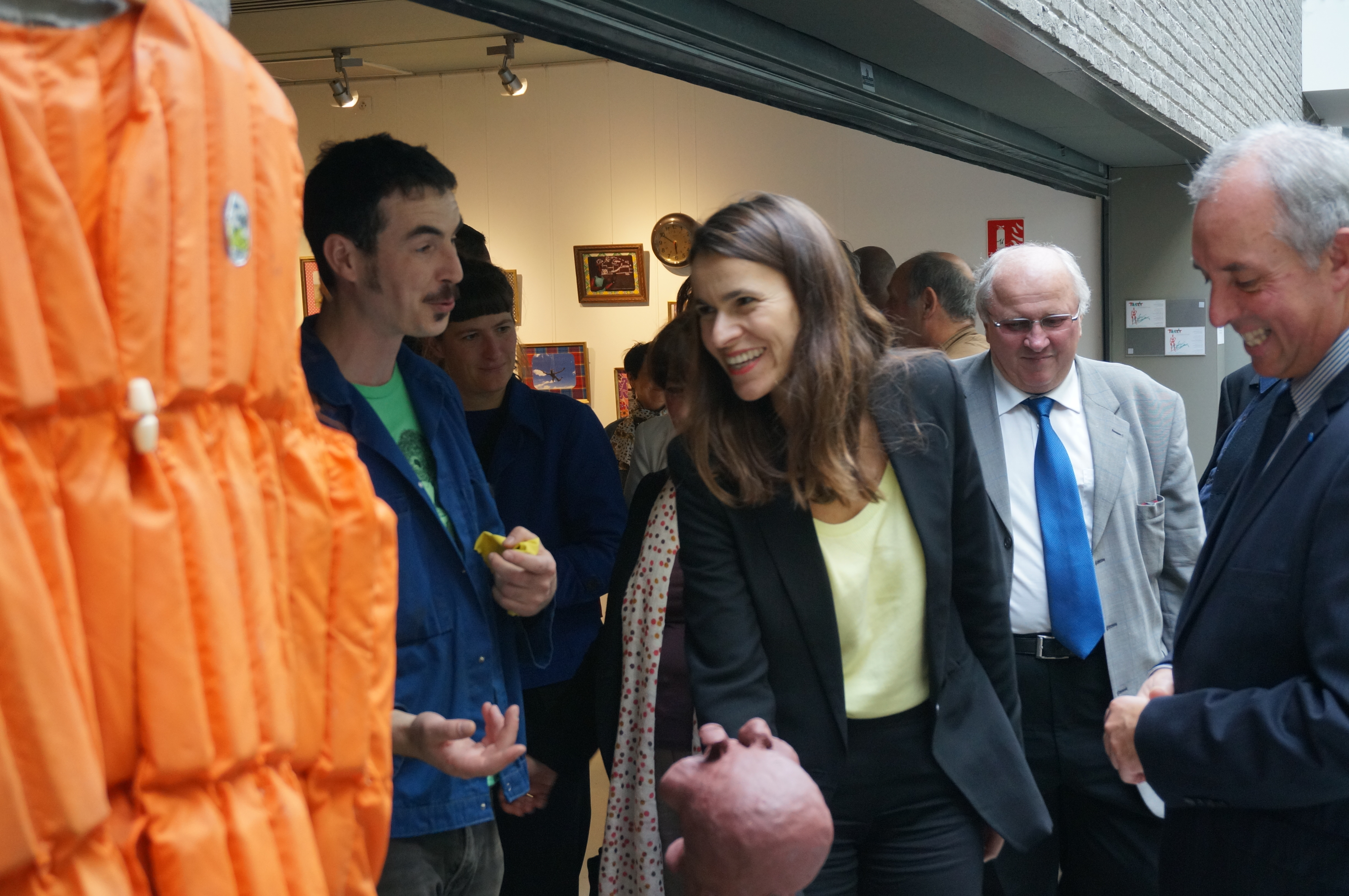 Aurélie Filippetti au Festival mondial des théâtres de marionnettes en 2013 avec Bernard Gibaru .Exposition de la troupe Tantôt à la médiathèque, l'un des membres présente la marionnette .